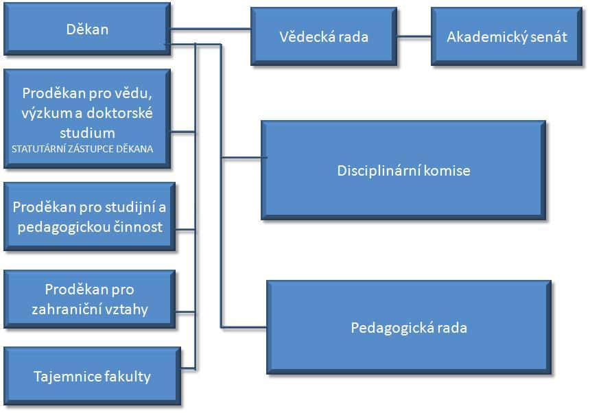 vedeni fakulty